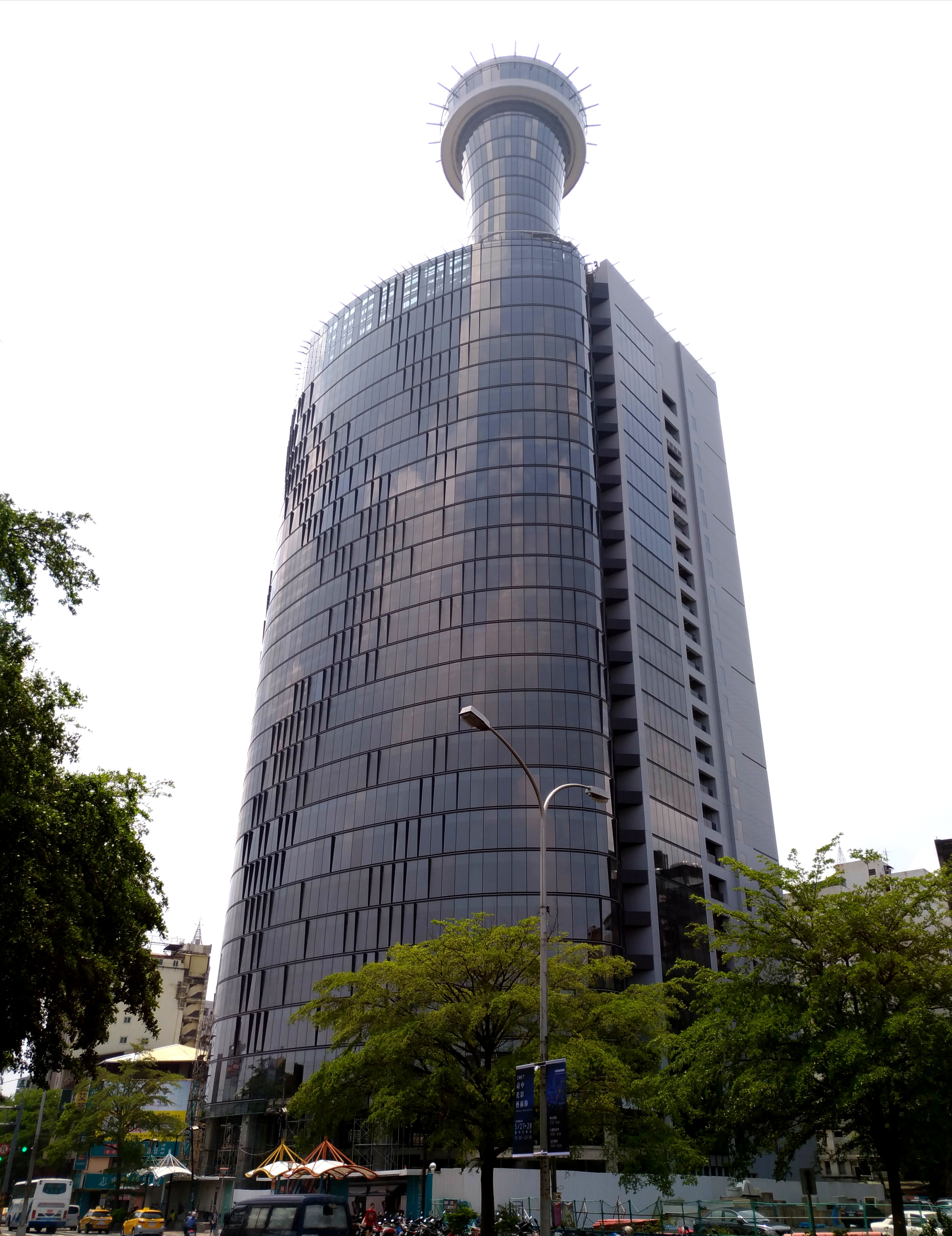 中文（台灣）: 台中李方艾美酒店